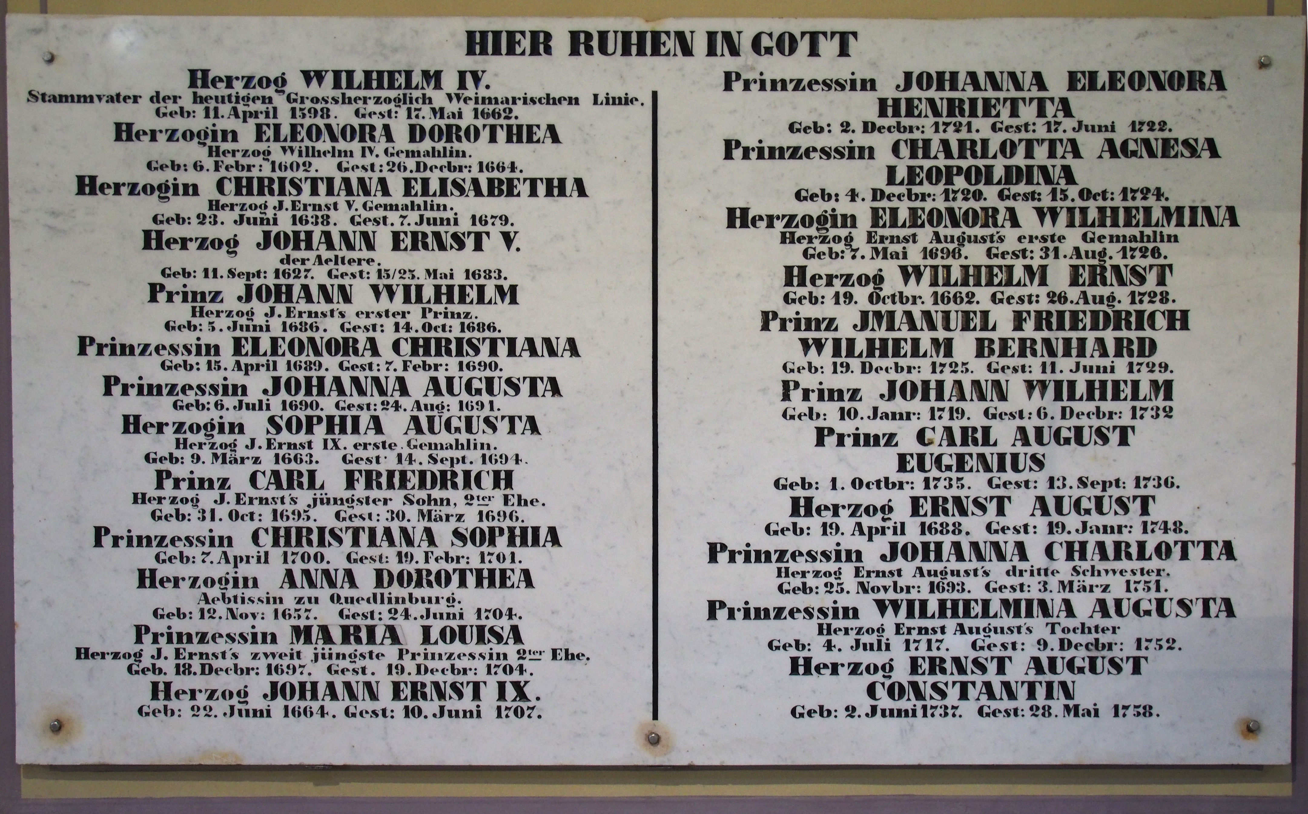 Verzeichnis der Särge in der Fürstengruft auf dem Historischen Friedhof (Weimar)